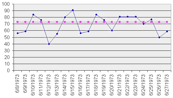 Simple Run chart